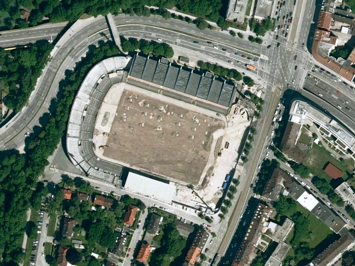 Luftaufnahme der Bayerischen Vermessungsverwaltung: Städtisches Stadion an der Grünwalder Straße in München, Bayern, während eines Umbaus im Jahr 2012.